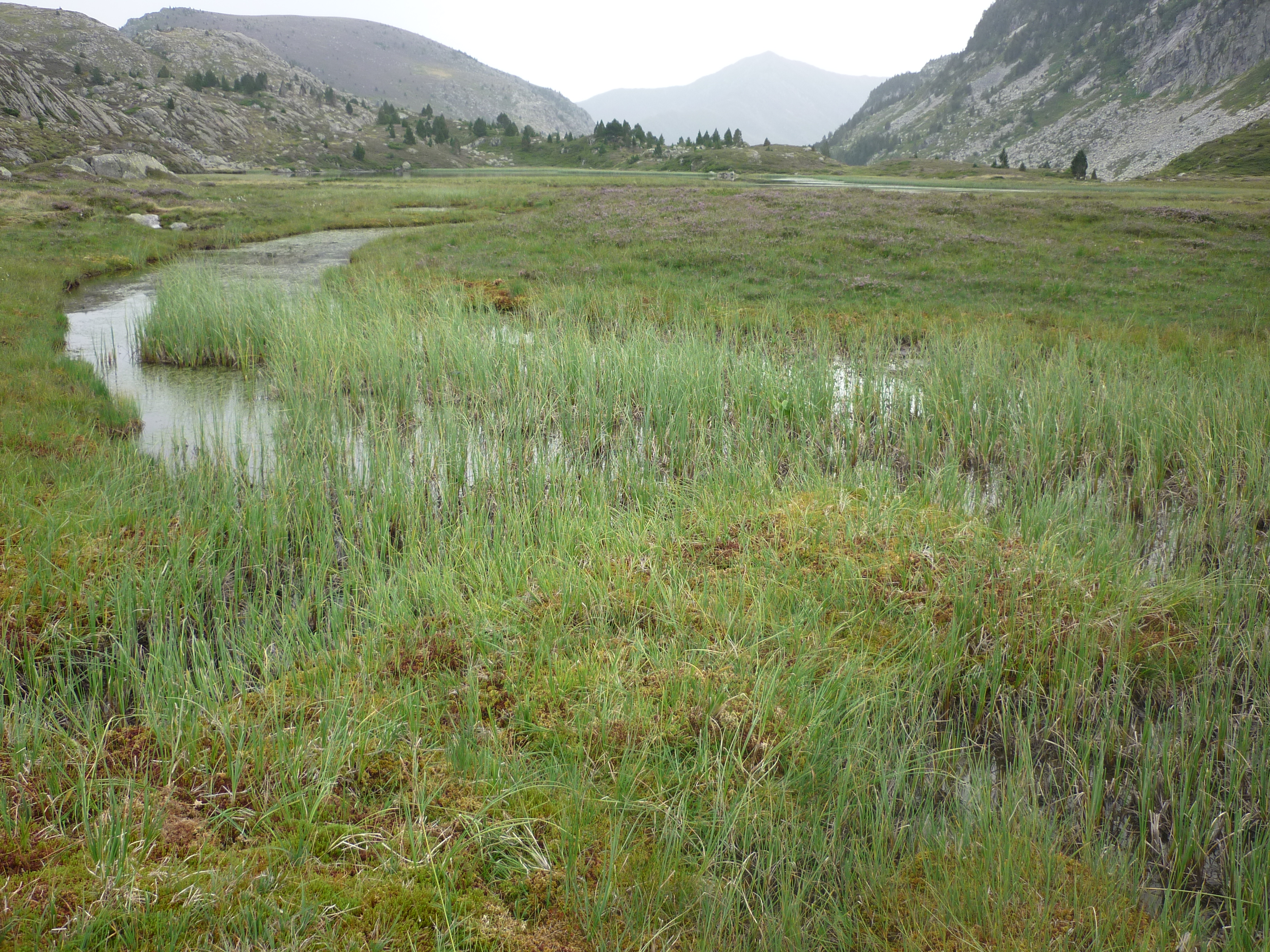 Tourbière en montagne dite du Pla de la Font à Bassiès (Auzat) en Ariège dans les Pyrénées